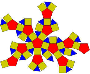 развертка ромбоикосидодекаэдра